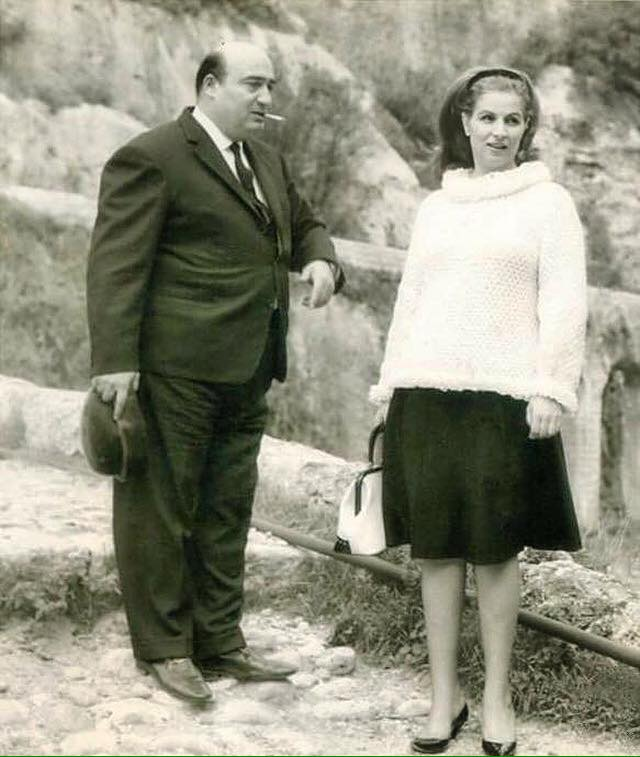 الشحرورة صباح ووديع صافي1950